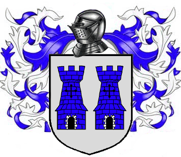 Estandarte creado con photoshop usando material libre o creado ex profeso por mi e inspirado por las obras de Canción de Hielo y Fuego.